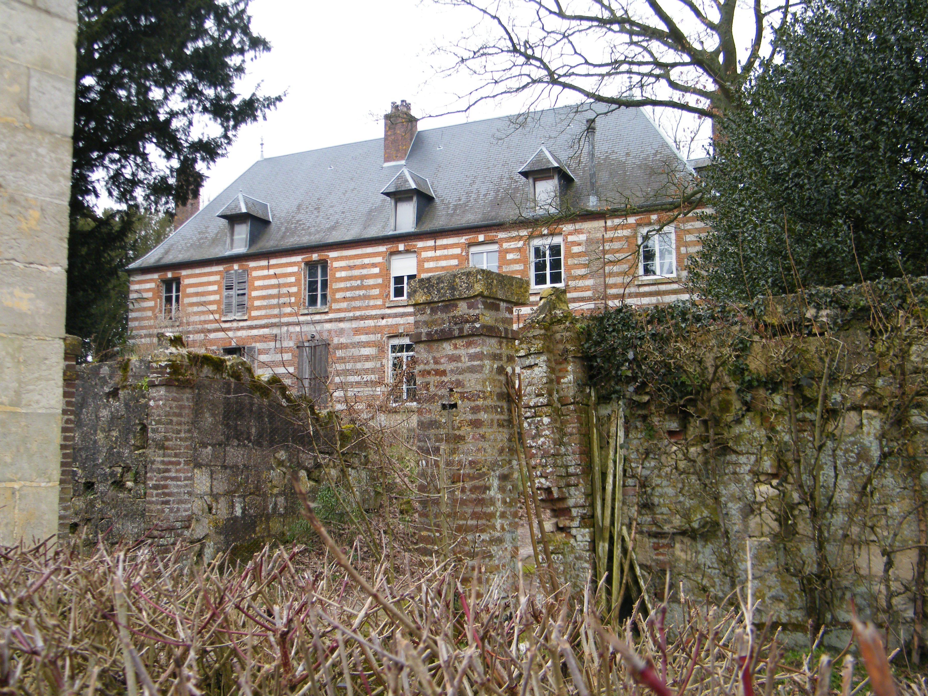 Ancienne maison de l'abbé, abbaye de Forest-Montiers, devenue propriété privée.